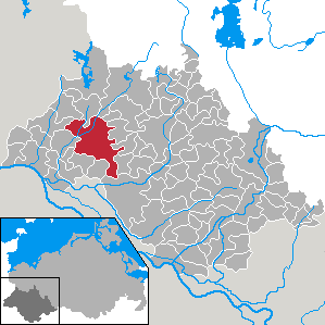 Vellahn in Mecklenburg-Vorpommern - district Ludwigslust